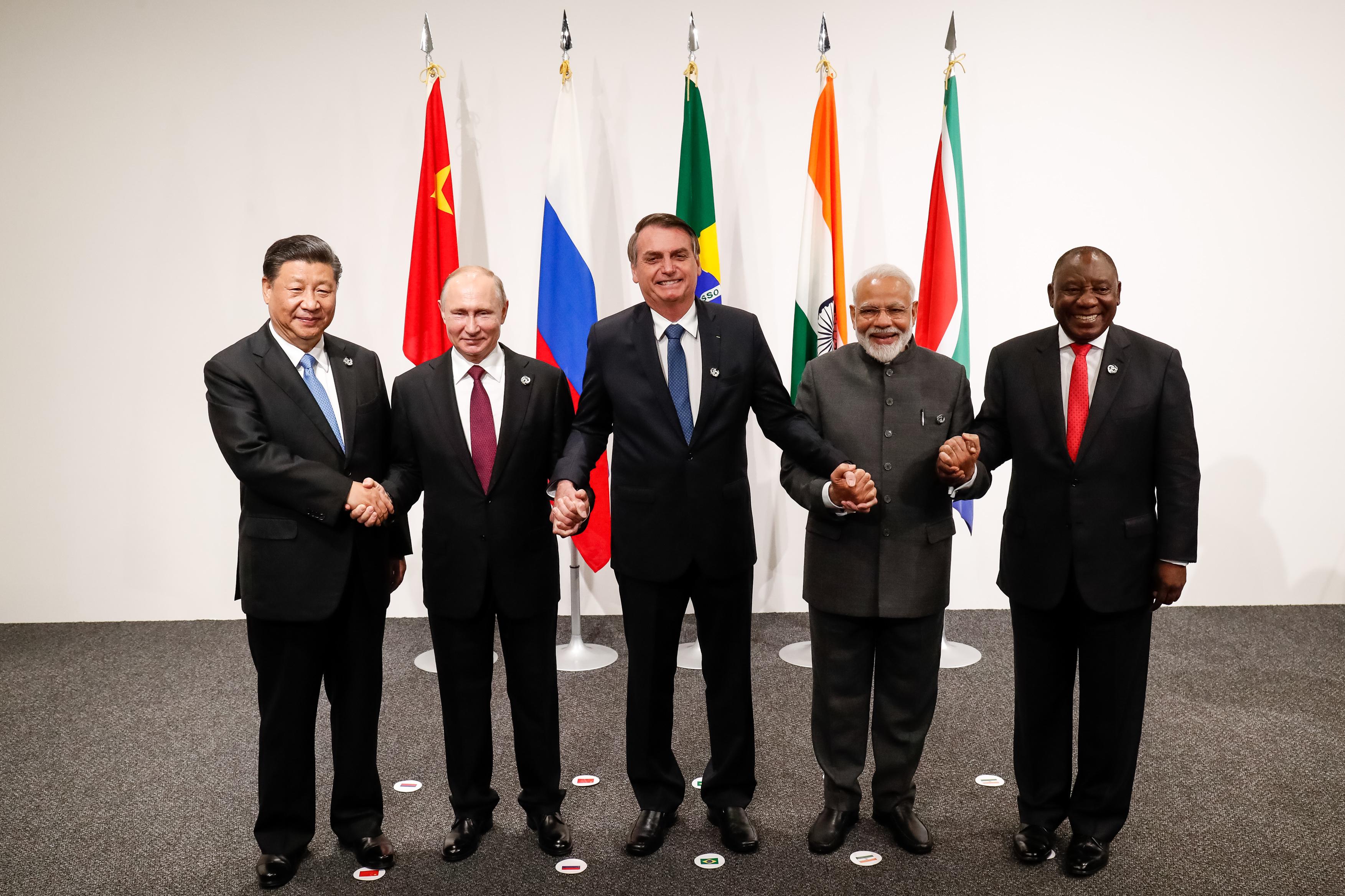 (Osaka - Japão, 28/06/2019) Presidente da República, Jair Bolsonaro, durante foto de família dos Líderes dos BRICS.Foto: Alan Santos / PR